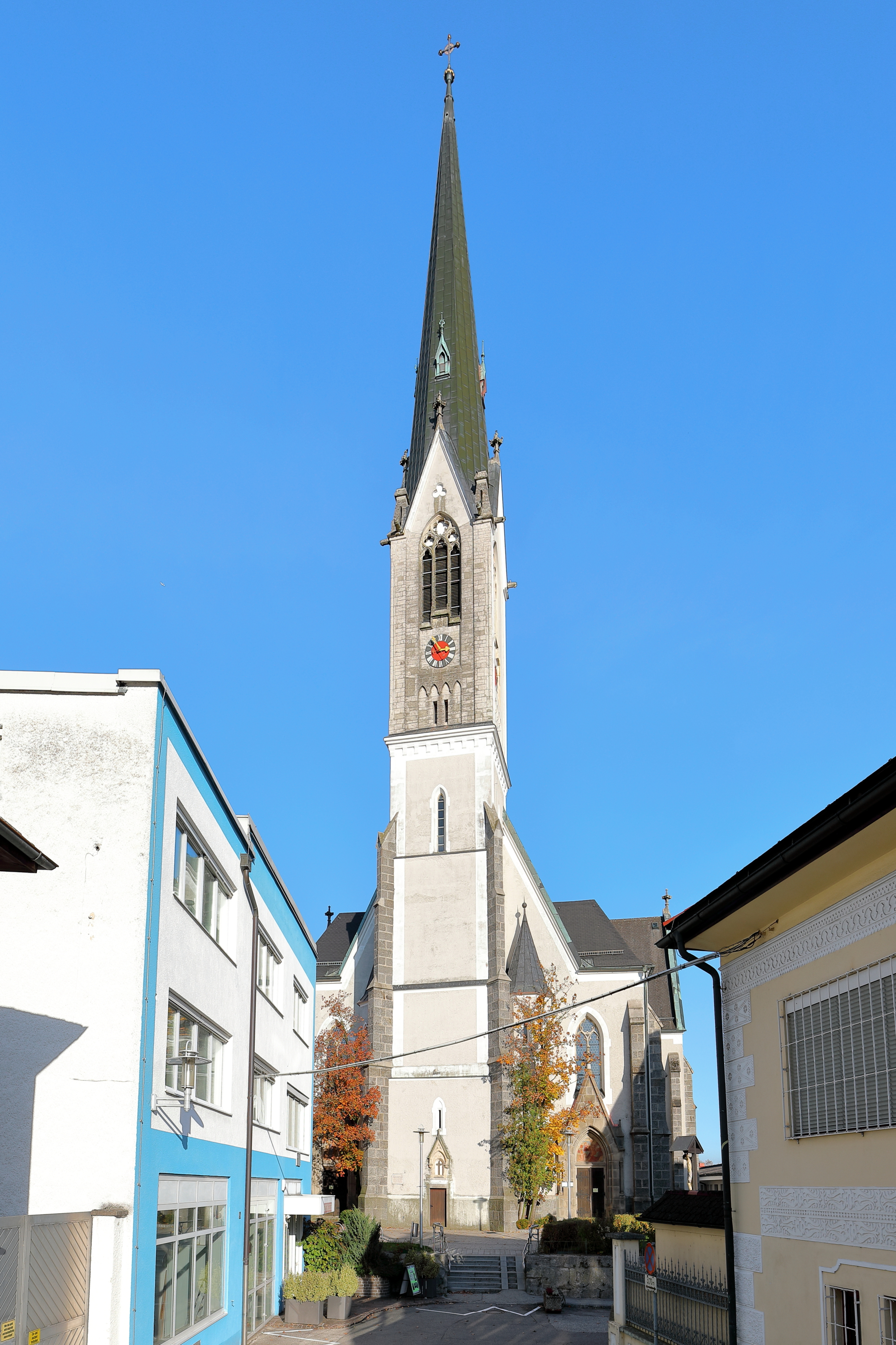 Die röm.-kath. Pfarrkirche hl. Michael in der oberösterreichischen Stadtgemeinde Schwanenstadt. Die Kirche mit dem weithin sichtbaren 78 m hohen Kirchturm wurde von 1900 bis 1902 im neogotischen Stil errichtet.